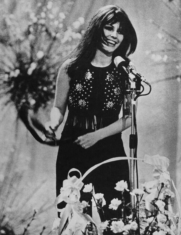 Sanremo, Casinò Municipale, 28 febbraio 1970. L'attrice e cantante italiana Claudia Mori esegue la canzone Chi non lavora non fa l'amore — cantata in coppia con il marito Adriano Celentano (fuori quadro) — durante la serata finale del XX Festival della Canzone Italiana di Sanremo, vinto proprio dalla coppia Celentano-Mori col succitato brano.